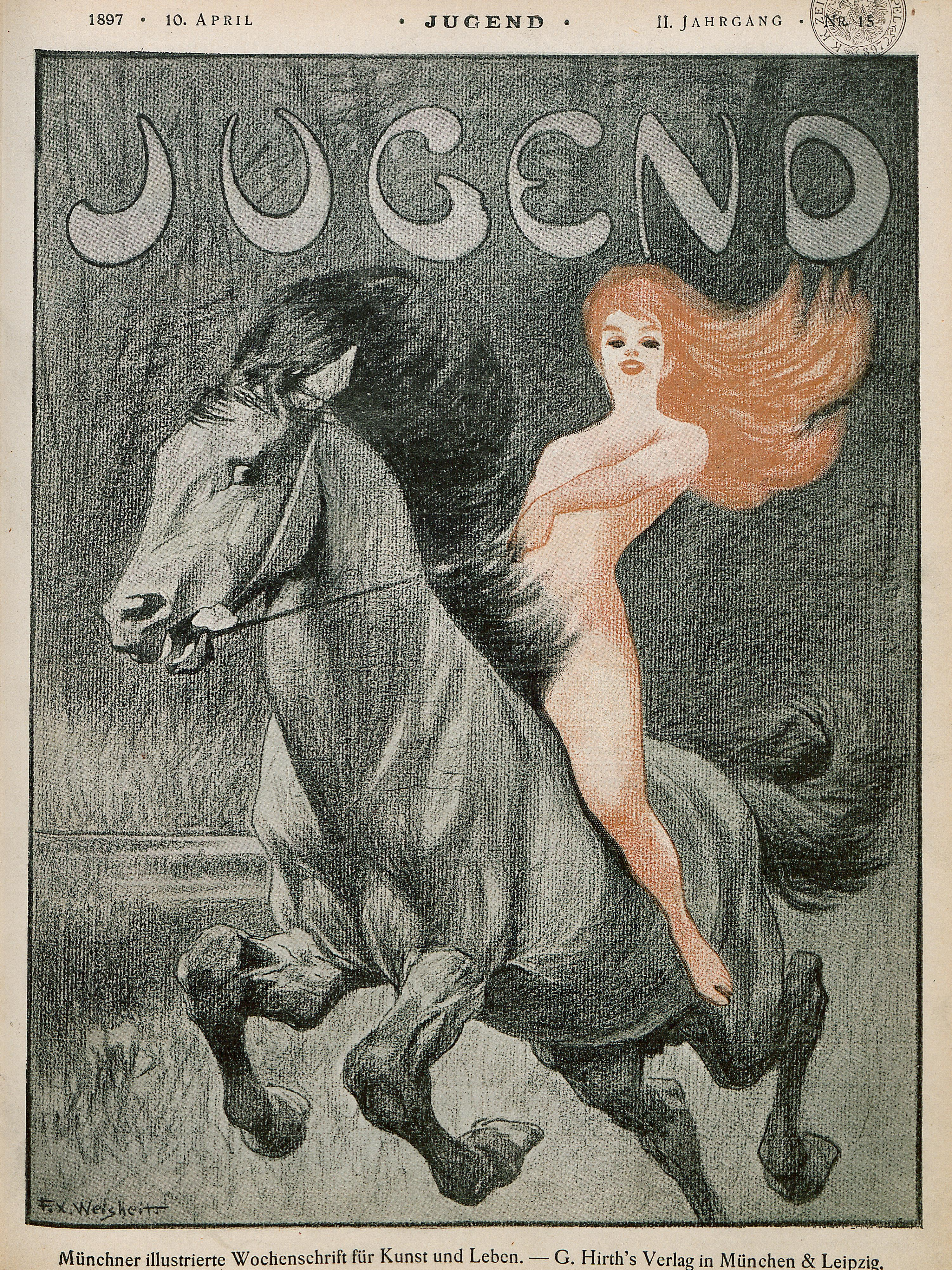 F. X. Weisheit - Umschlag der Kunst- und Literaturzeitschrift "Jugend", Ausgabe Nr. 15, 1897